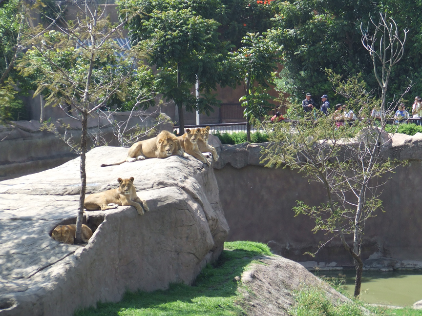 Albergue de Leones